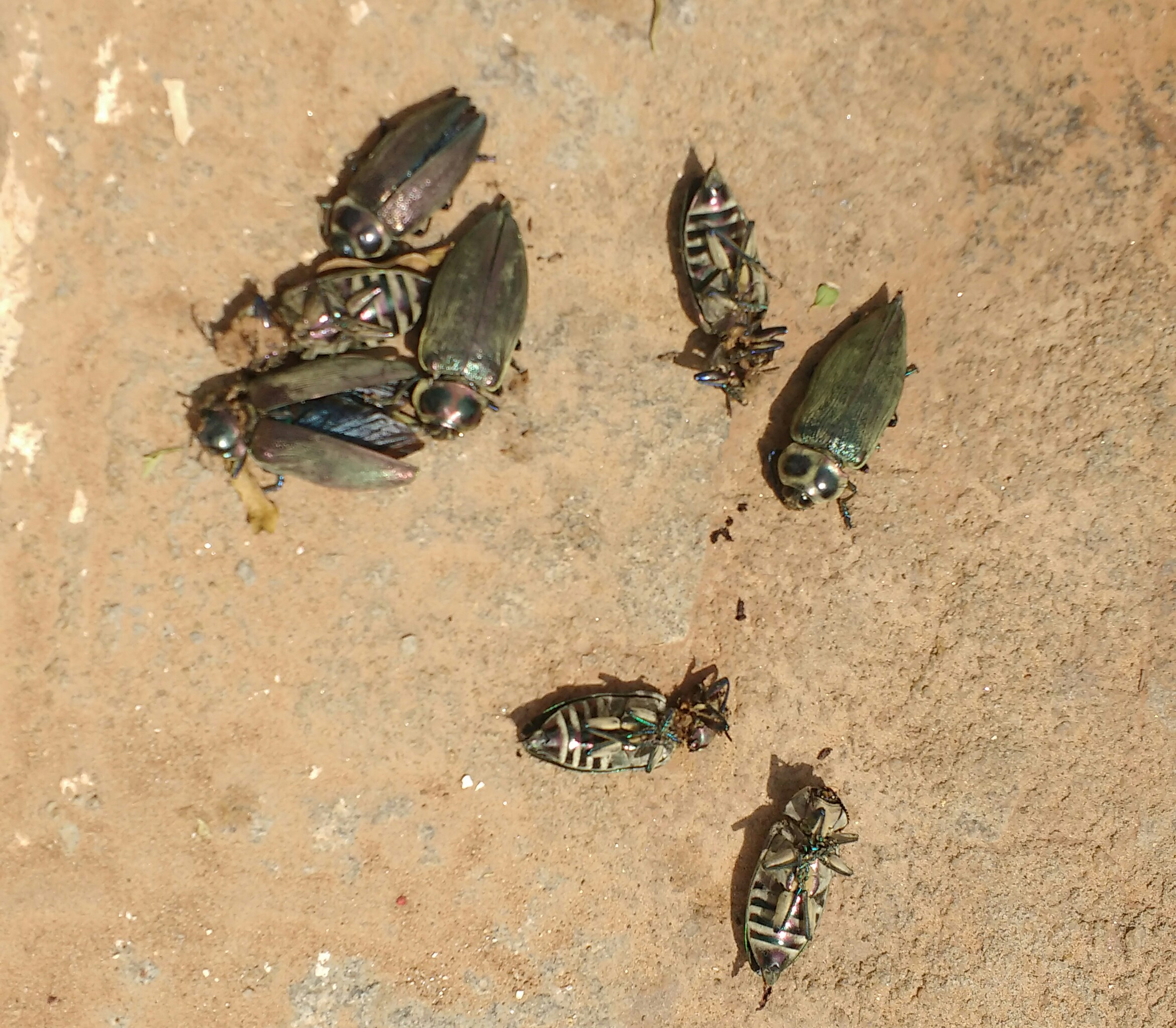 Extermínio individual de "mãe-do-sol" (E. gigantea) em Caetité, Bahia, Brasil.